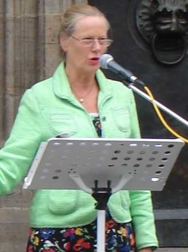 Birgit von Lemm während einer öffentlichen Kundgebung vor der Lorenzkirche in Nürnberg